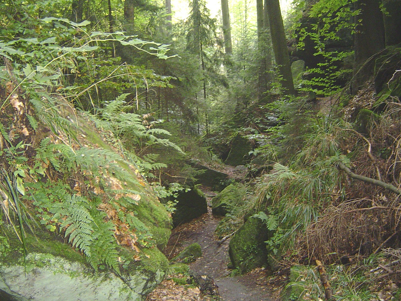 Naturschutzgebiet „Teufelsloch“ im Ortsteil Oberwaiz, Gemeinde Eckersdorf